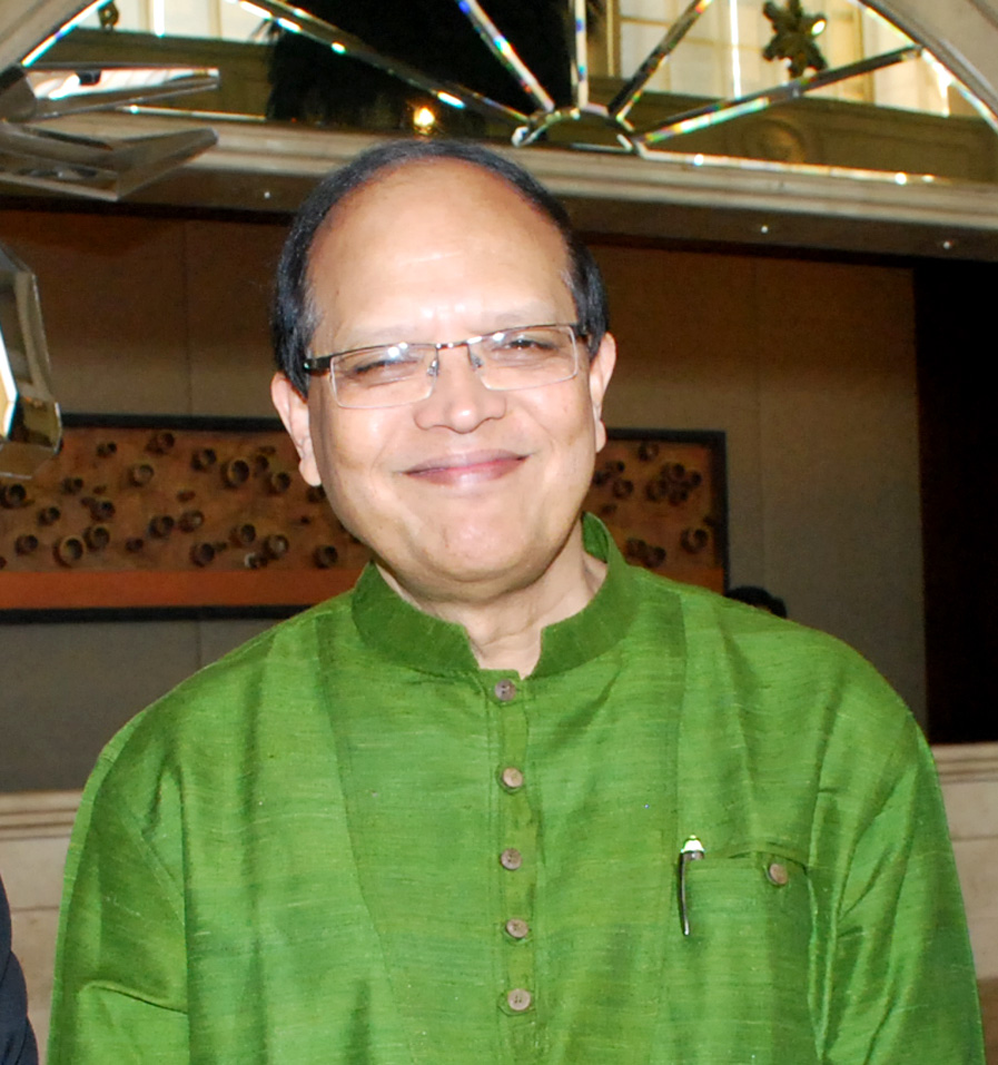 আতিউর রহমান